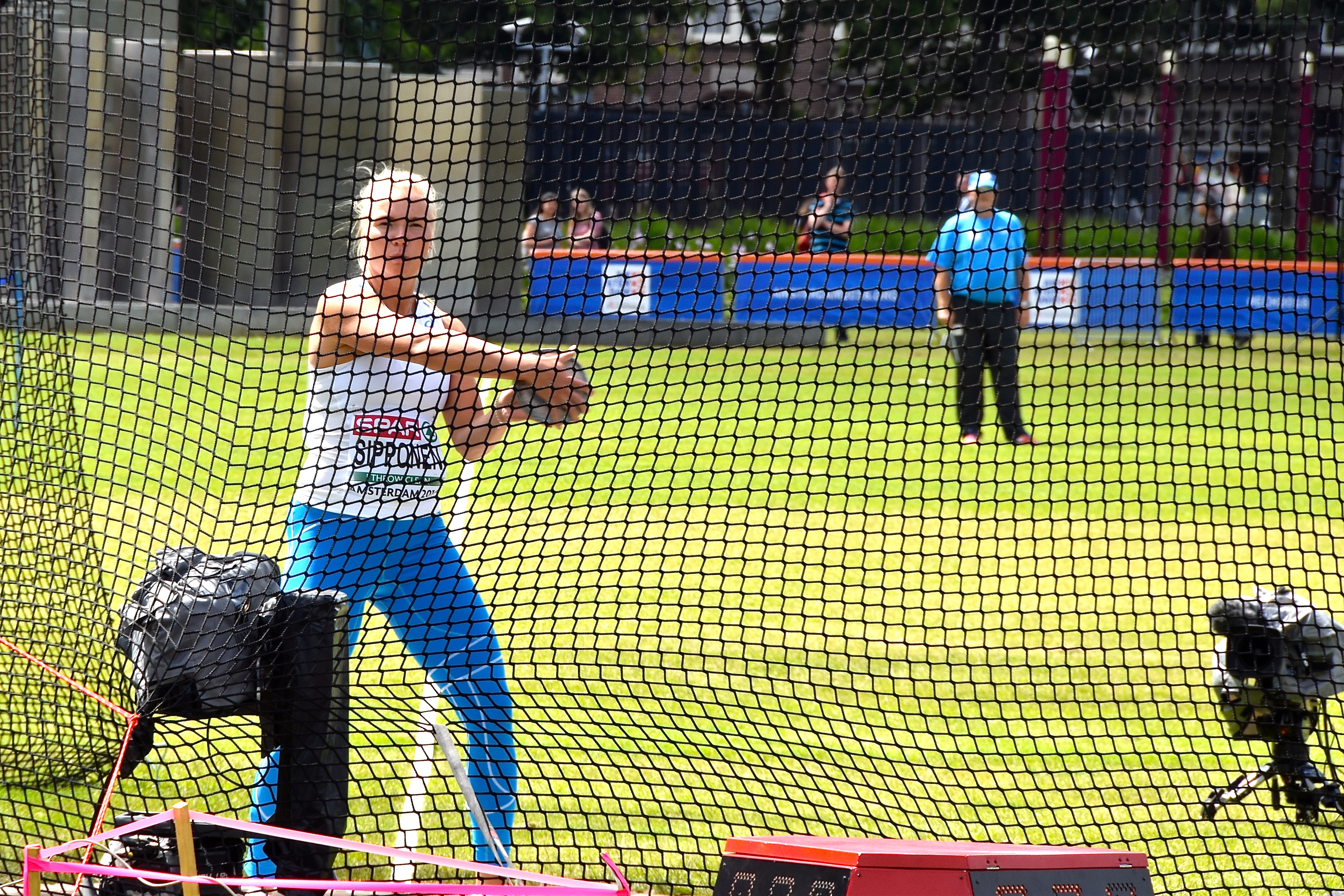 De Finse Salla Sipponen (Maaliskuuta 1995) tijdens de voorronde van het Europees Kampioenschap discuswerpen op het Museumplein Amsterdam. Ze moest minimaal 58m gooien om de finale te halen. Dat lukte niet. Na 3x werpen, was het einde oefening.